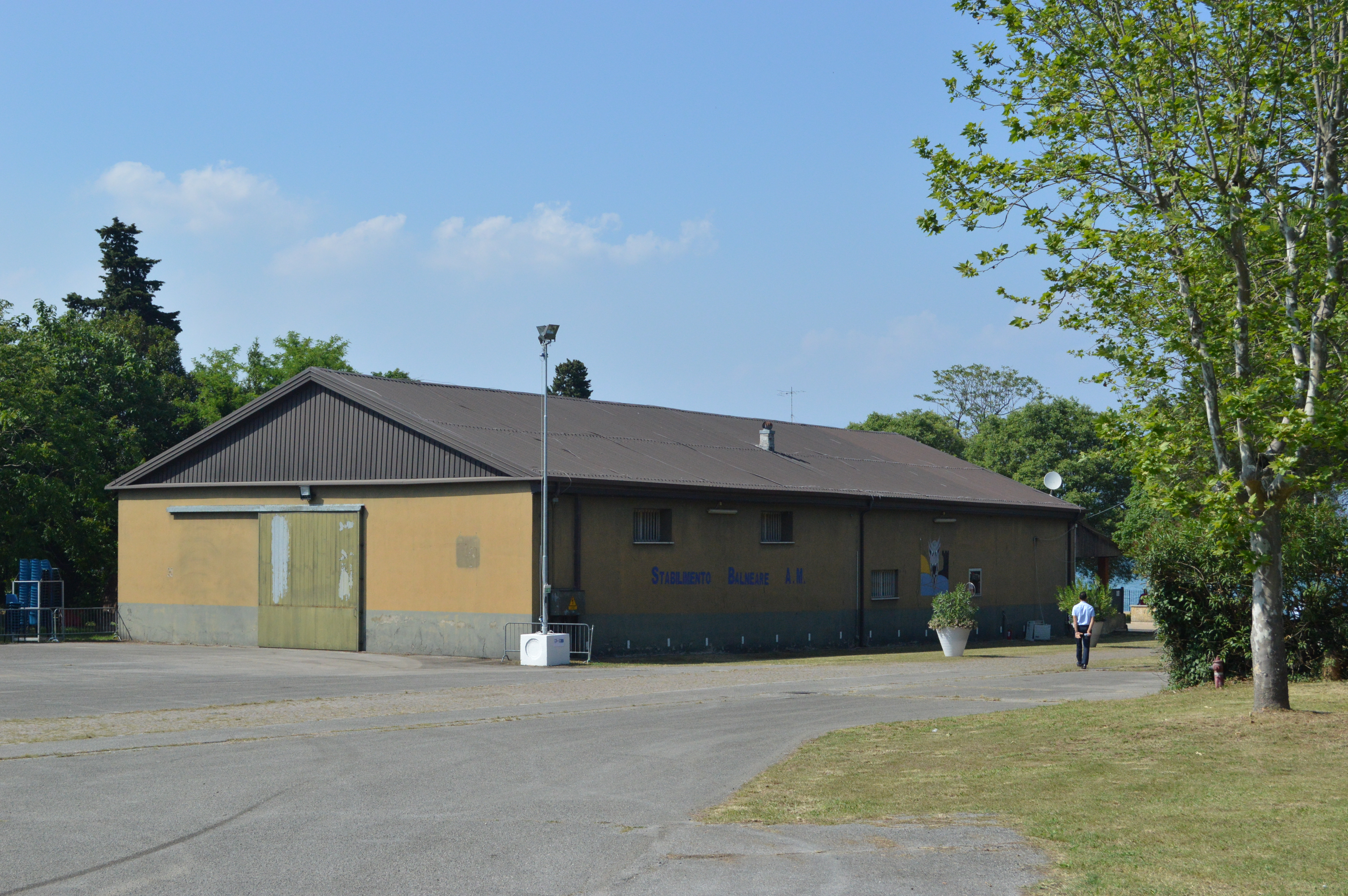 Uno degli hangar dell'Idroscalo di Desenzano del Garda.